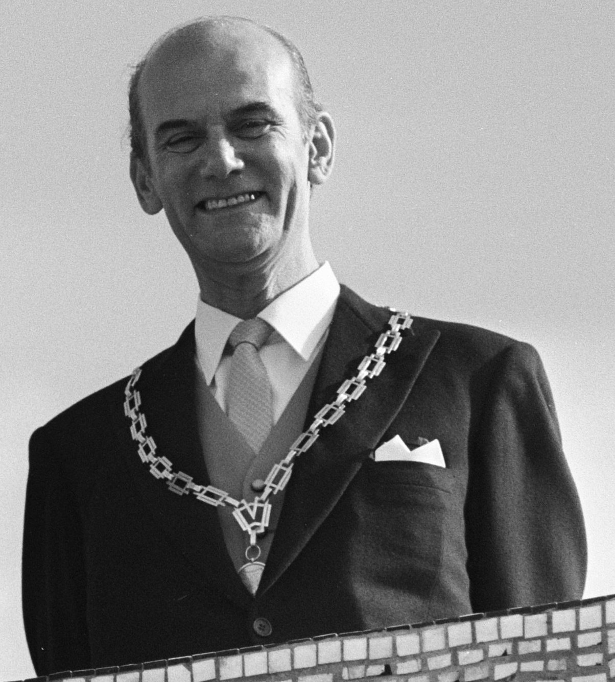 Koningin Juliana en de burgemeester op het bordes van het stadhuis van Barendrecht